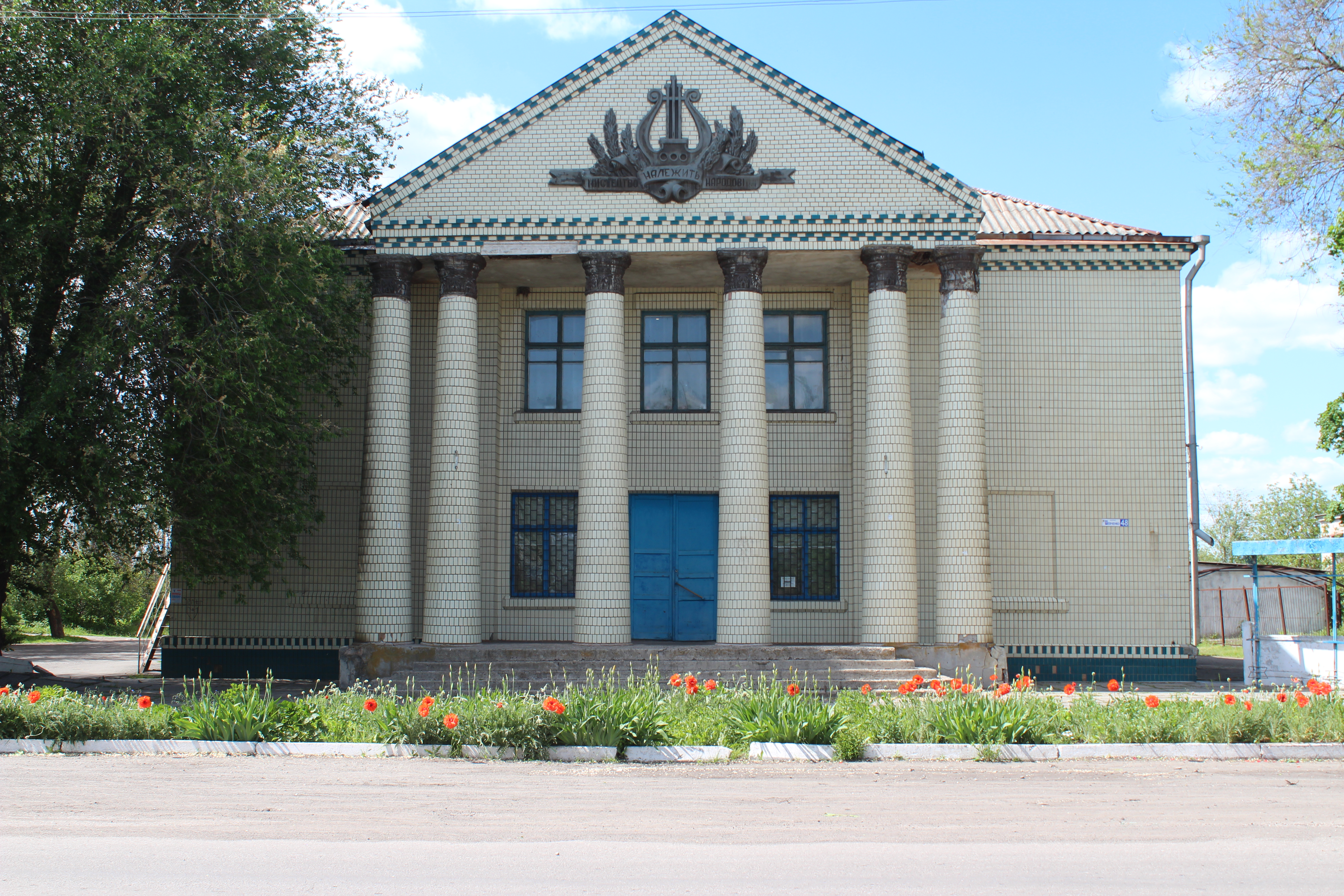 Новомосковська центральна районна бібліотека для дорослих